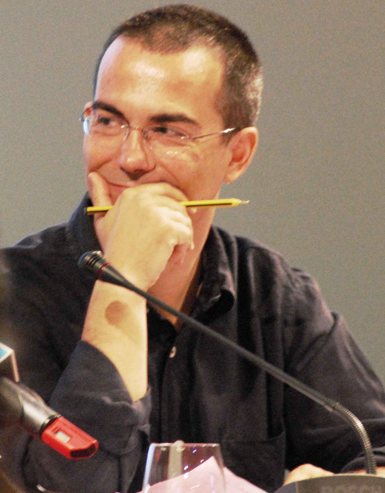 Giovanni Floris. Non stop Banda Larga PD venerdì 18 giugno 2010